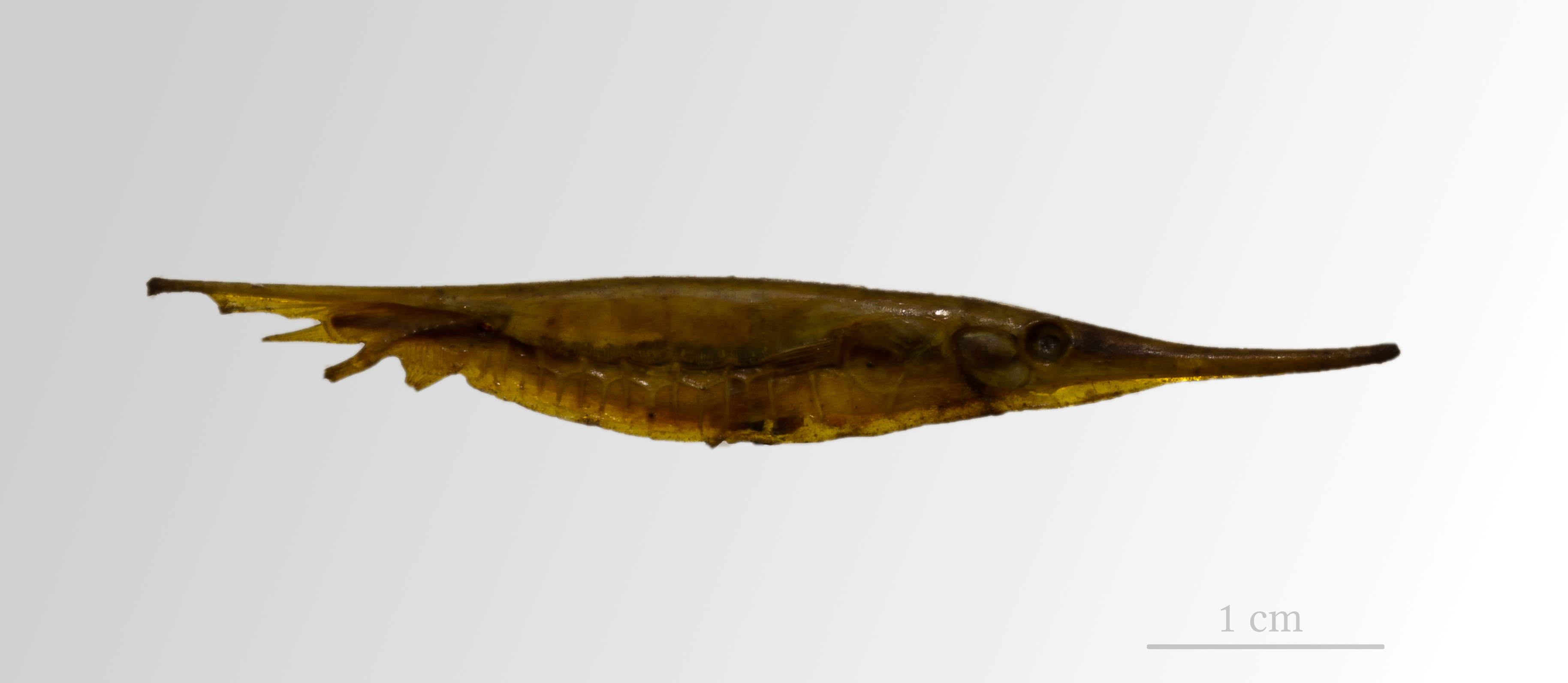 Poisson rasoir Centriscus sp.